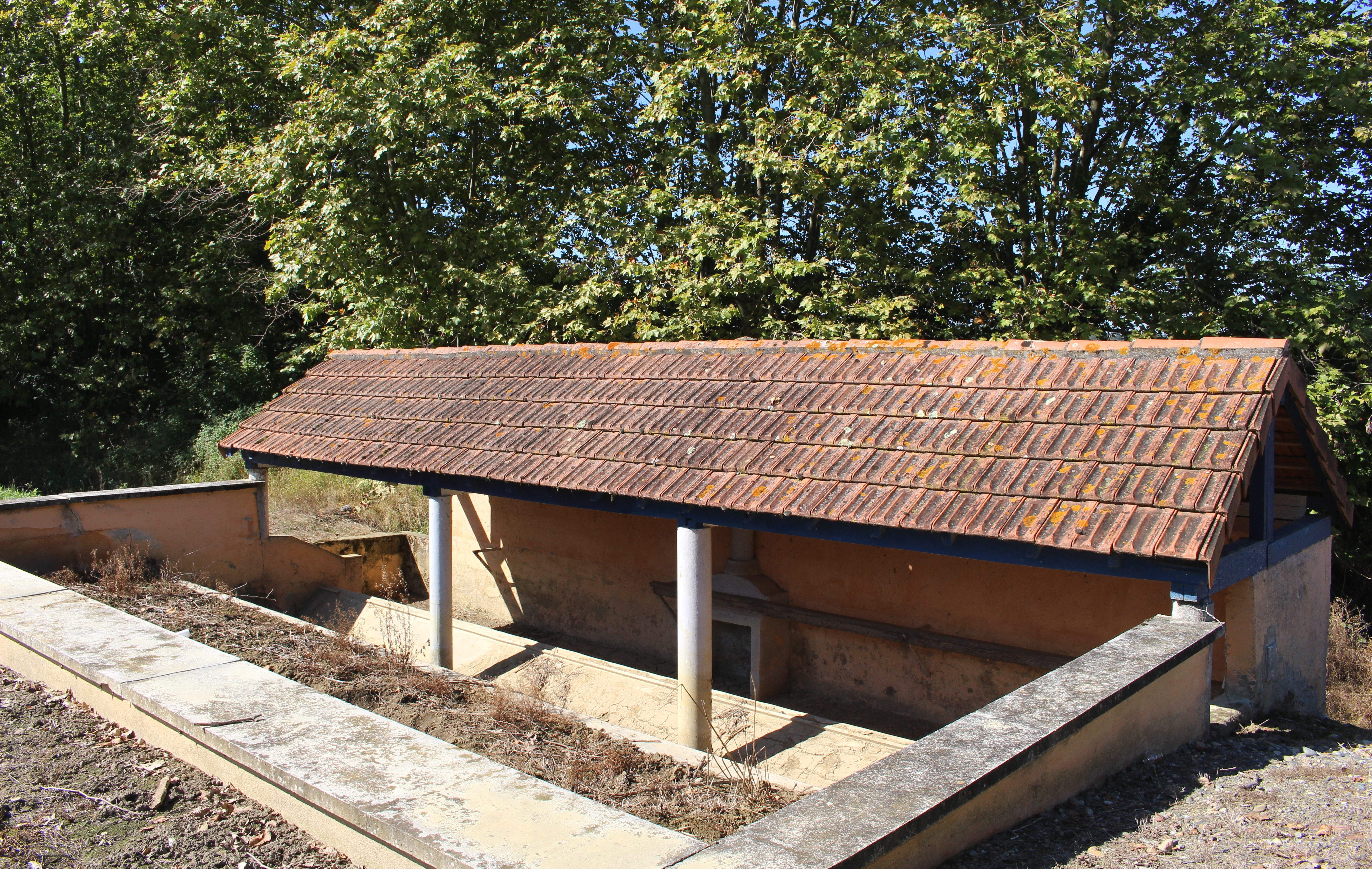 Lavoir de Lacassagne (Hautes-Pyrénées)